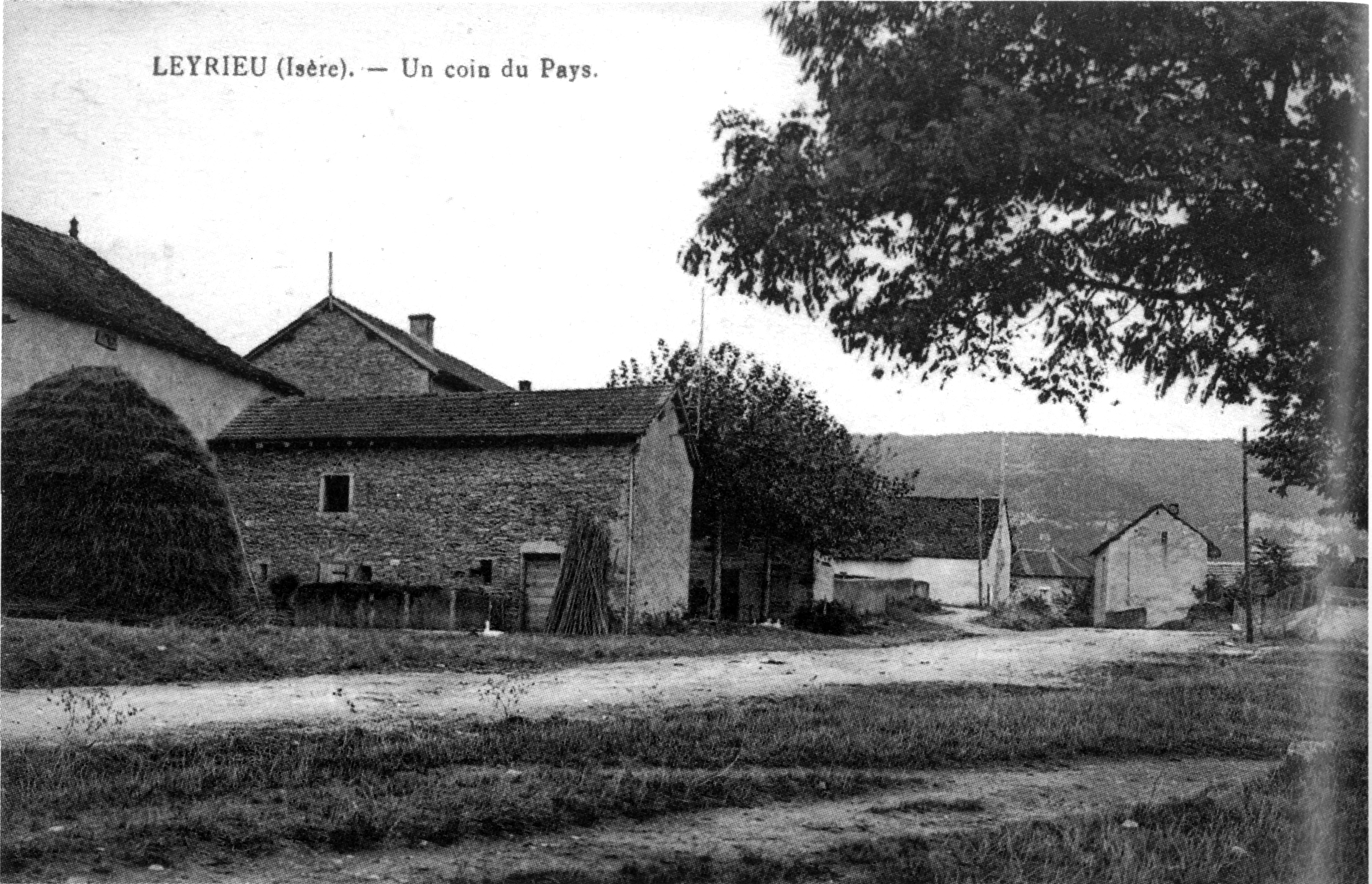 Leyrieu, un coin du pays en 1912